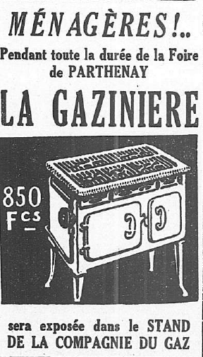 Publicité pour la gazinière 1935